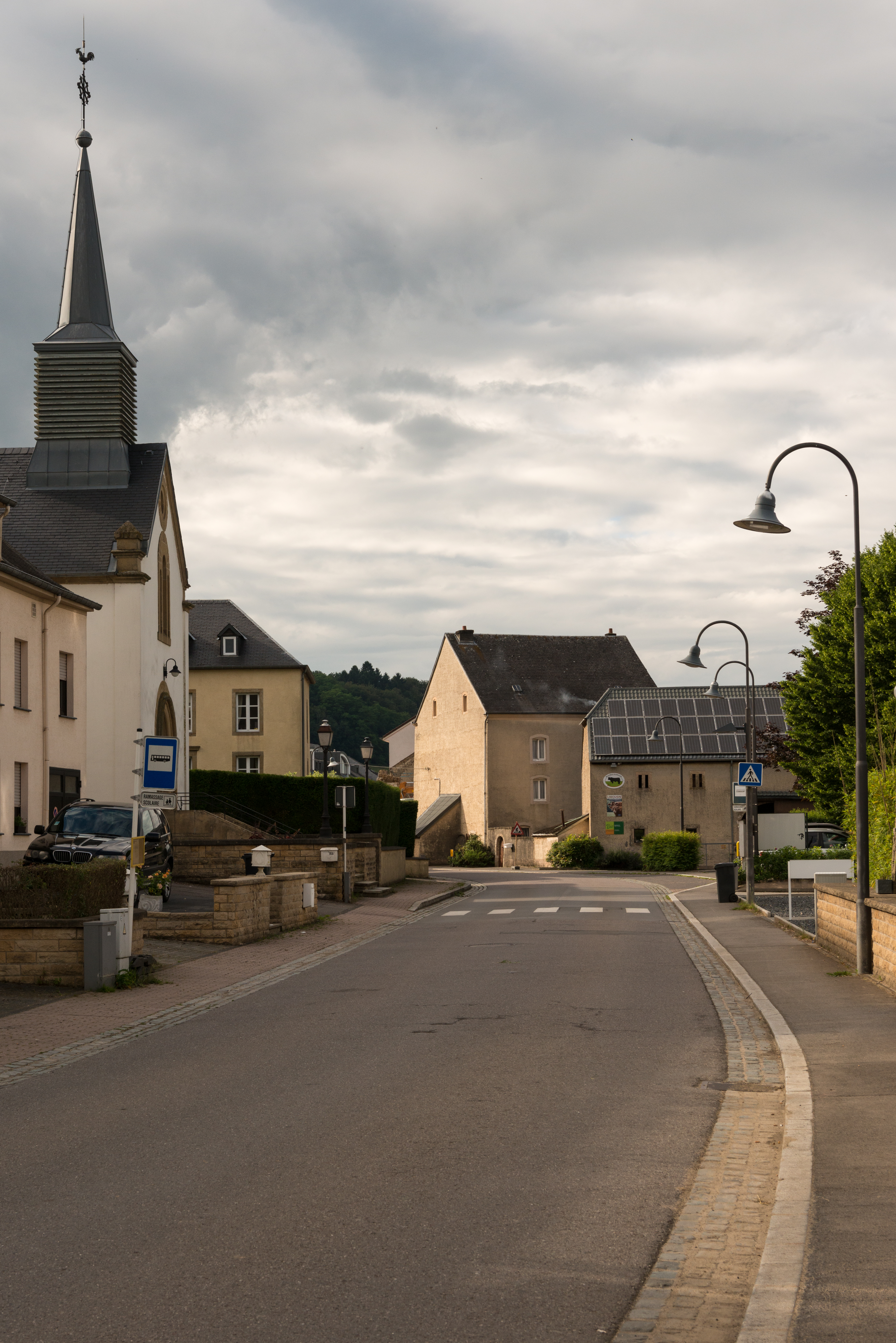 De CR123, hei d'Route de Mersch / Mierscherstrooss, zu Gousseldeng.